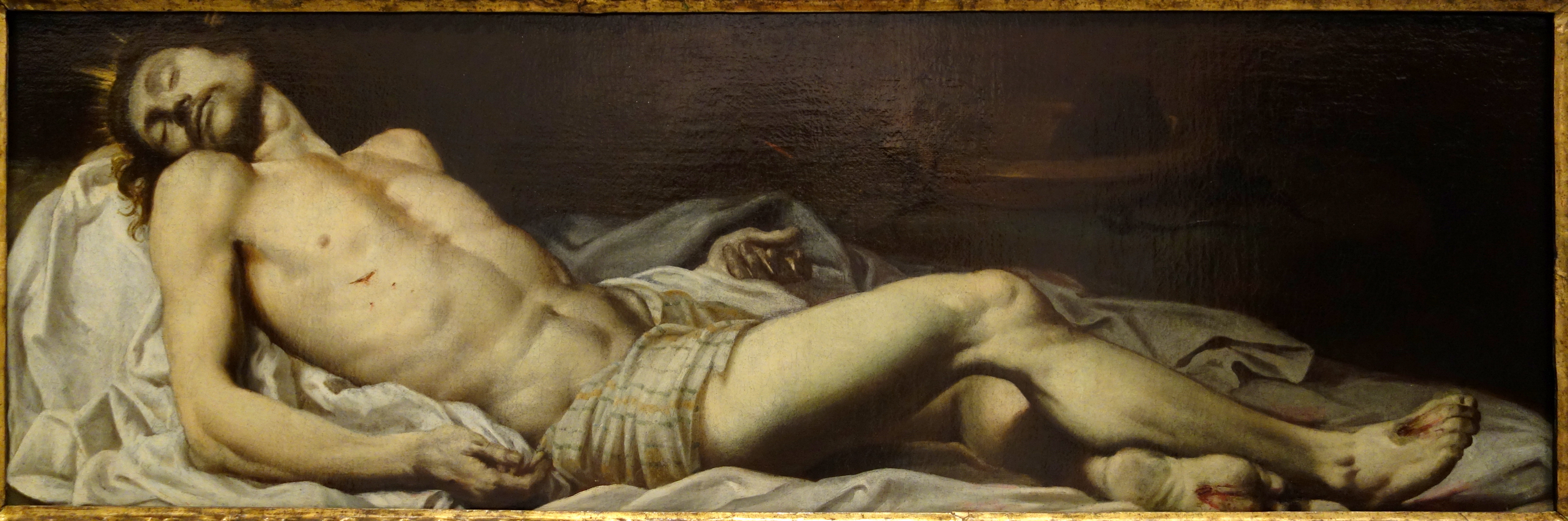 Cristo depostolabel QS:Lit,"Cristo deposto"